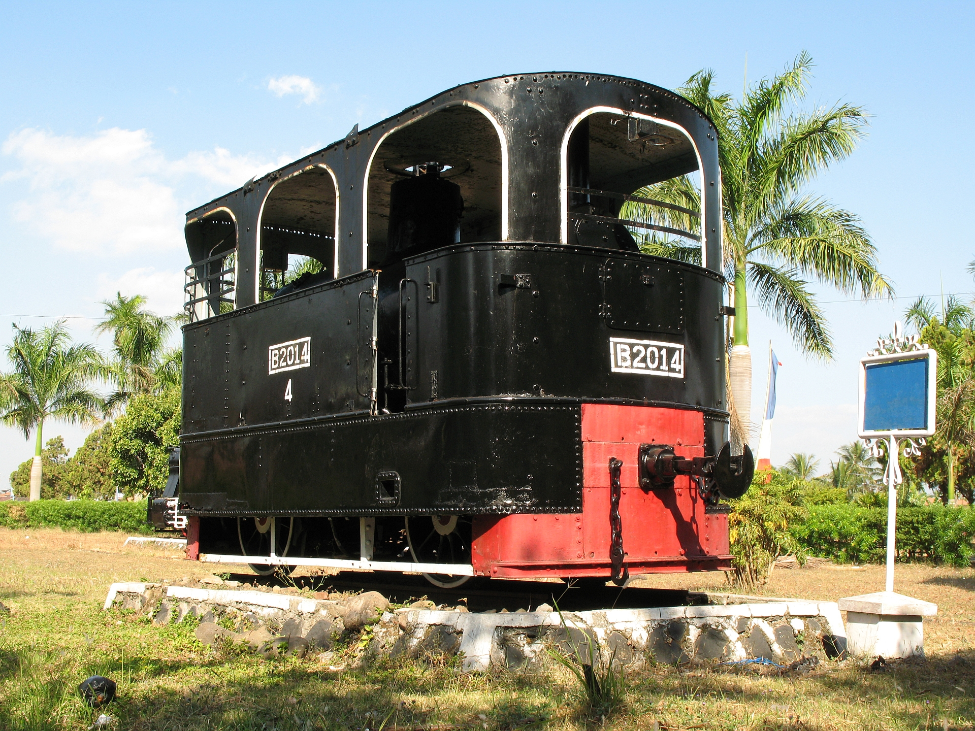 DKA B20 (B 20 14 C)